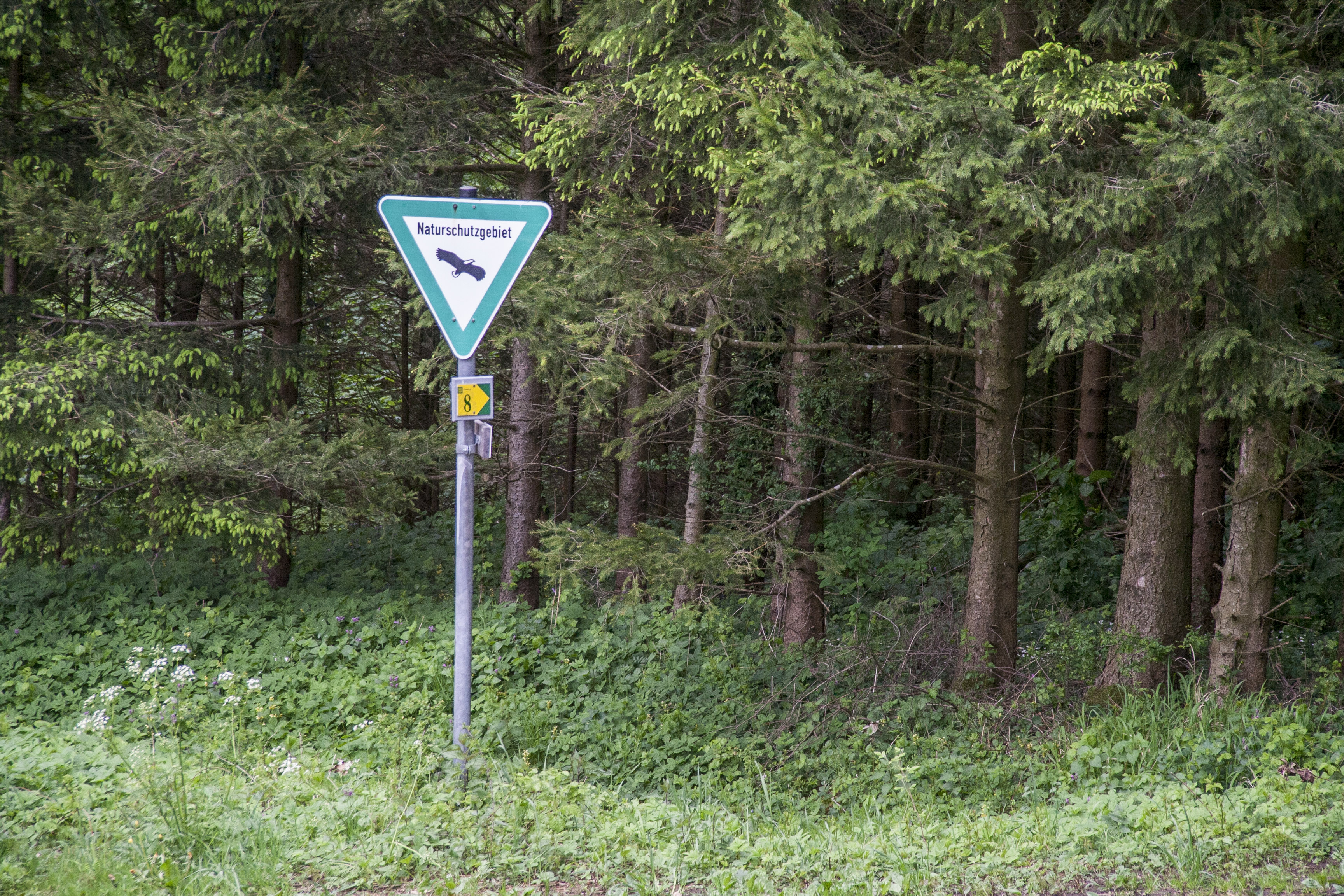 Naturschutzgebiet, Landkreis Roth, Greding, Sinterterrrassen, Naturpark Altmühltal